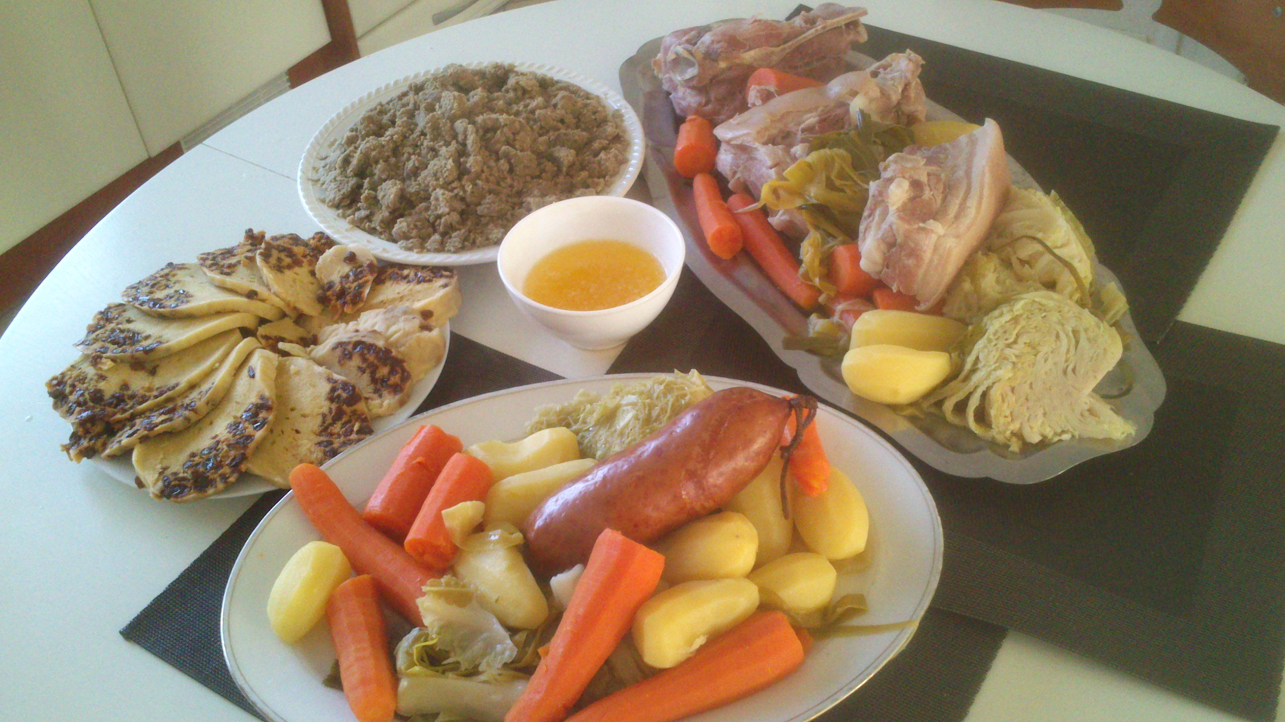 particularité : le farz noir est "brujuné émietté)"le farz blanc sucré est tranché